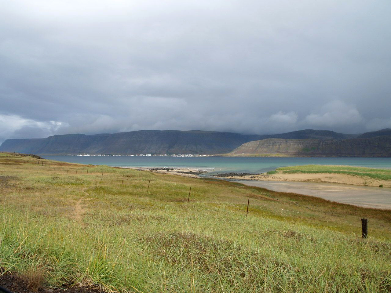 Blick auf Petreksfjördur